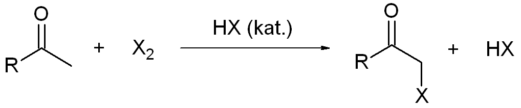 Ketonhalogenering reactieverloop